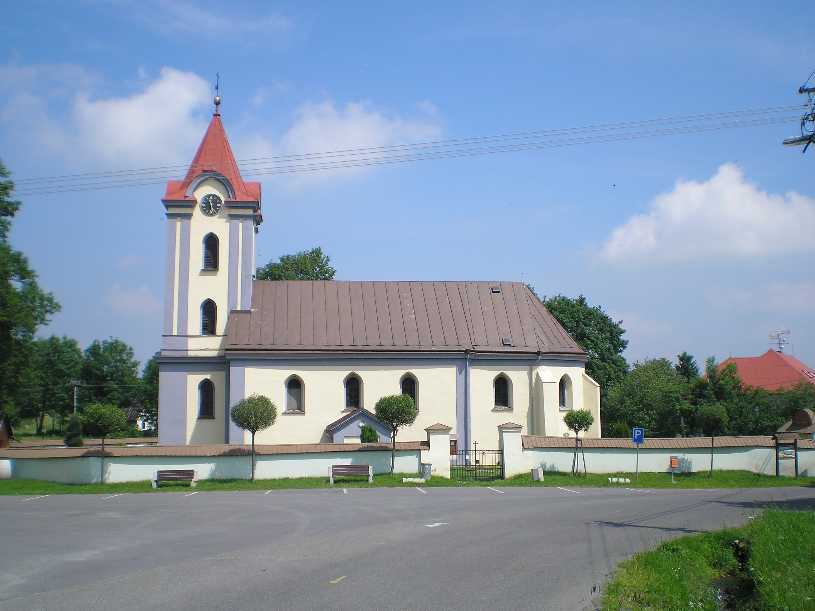 Roudno, kostel sv. Michala